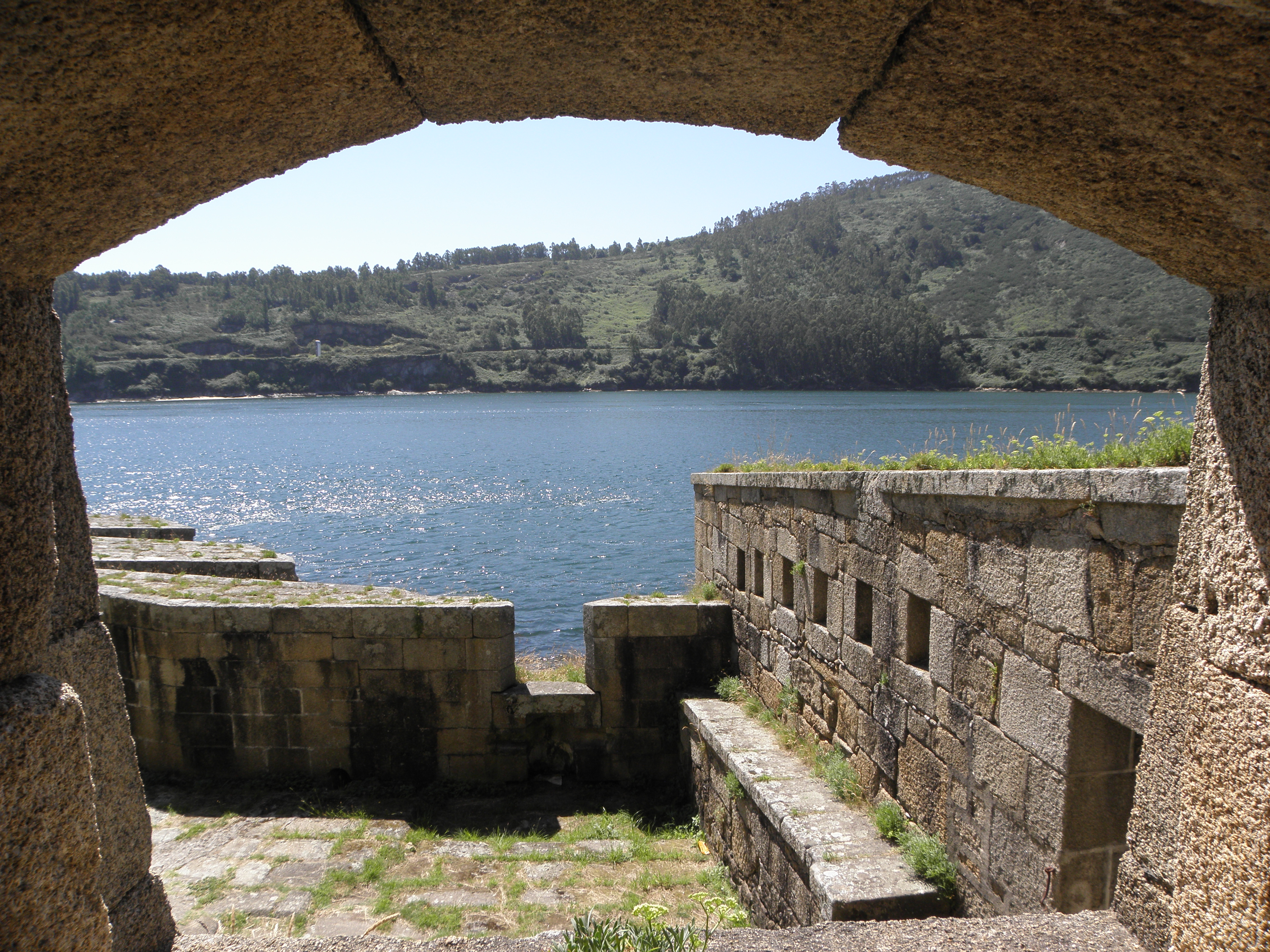 Ferrol